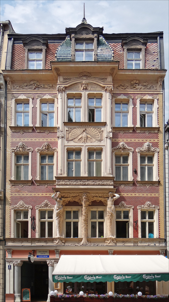 Vue d'ensemble de l'immeuble art nouveau au n°2 rue Smilsu à Riga Cet immeuble de style art nouveau (jugendstil) a été conçu en 1902 par l'architecte Konstantins Pekshens (K. Peksens : 1859-1928) Cet immeuble se trouve dans la ville ancienne et non pas dans les quartiers art nouveau des rues Elizabetes ou Alberta. Les décors sont très raffinés et expriment l'idée du renouvellement de la Nature et des arbres qui poussent. ____________ Riga, capitale de la Lettonie, est un parfait exemple de ville Art Nouveau. Son centre abrite la plus belle concentration de bâtiments Art nouveau au monde: plus d'un tiers d'entre eux appartiennent en effet à ce style. Cet ensemble architectural est inscrit sur la liste du Patrimoine mondial.... Extrait du site du réseau des villes art nouveau